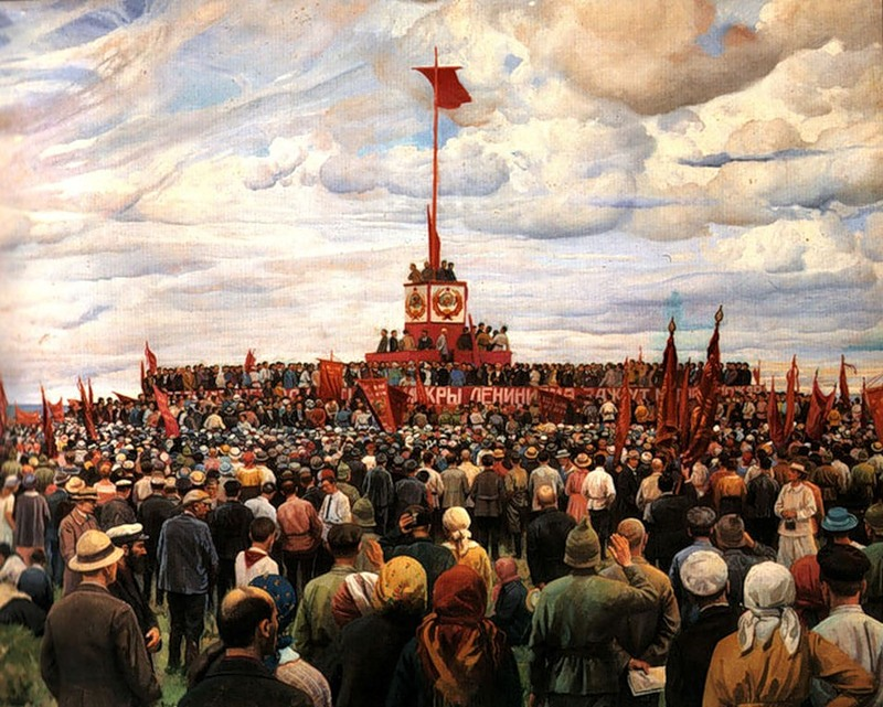 И. Бродский. Праздник Конституции. 1930